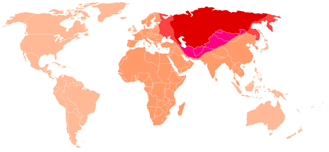 Территория Хартленда по Маккиндеру